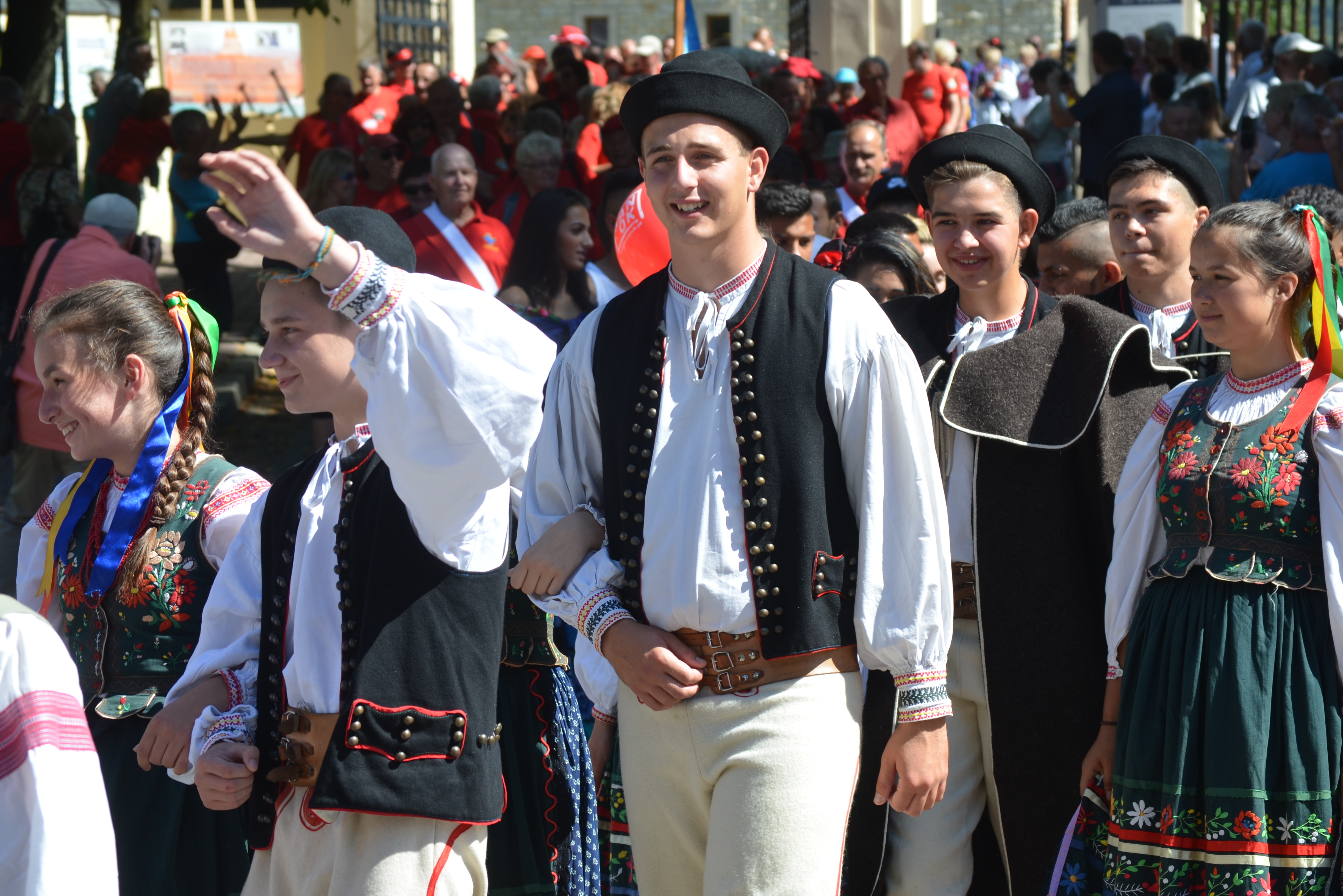 Die lemkische Folklore-Tanzgruppe-Ensemble Kyczera aus Legnitz